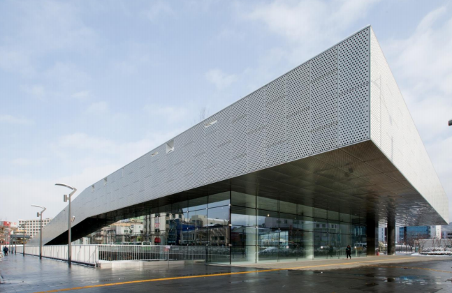 어린이문화원전경